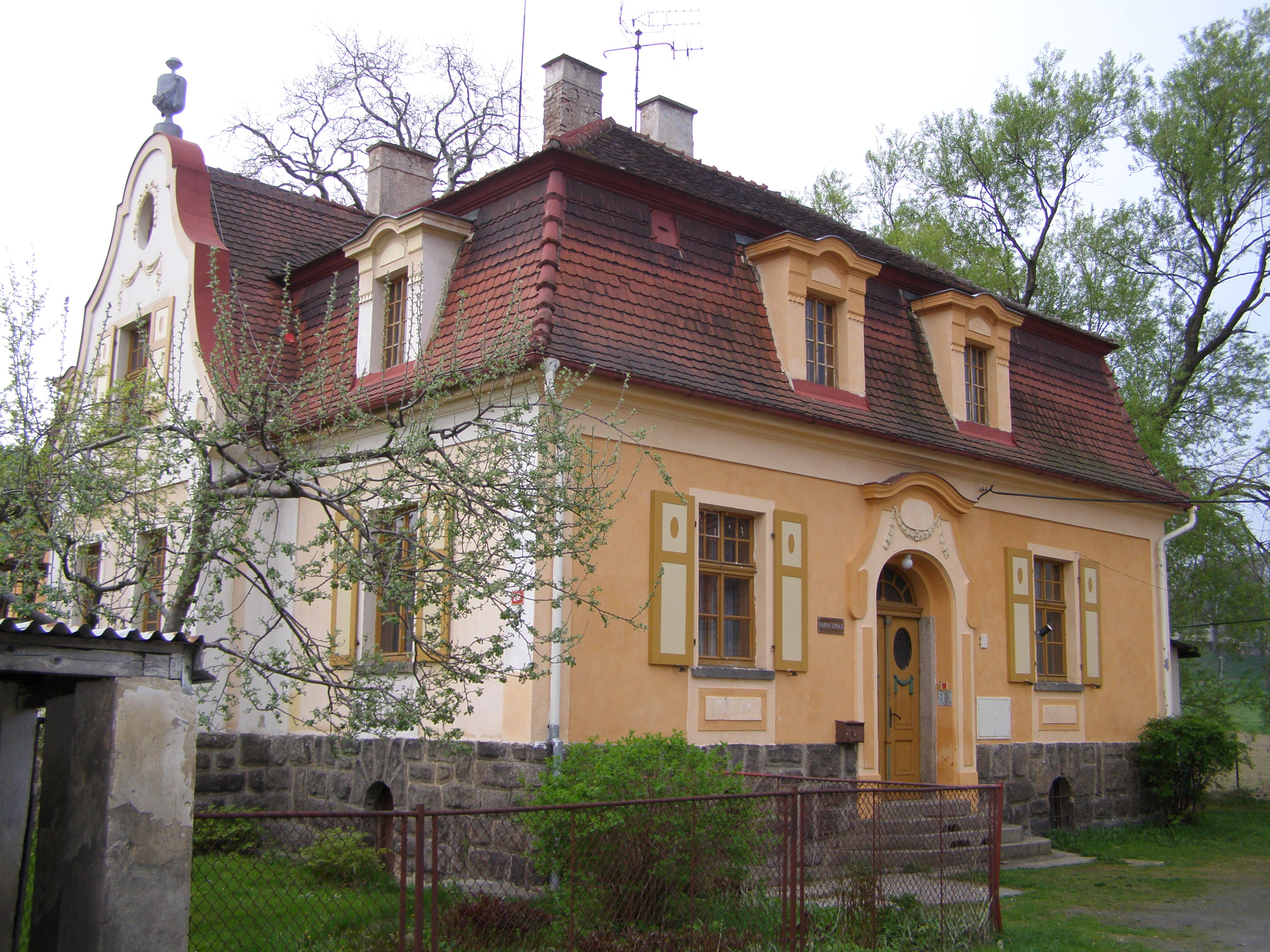 Raspenava, ulice Fučíkova, fara